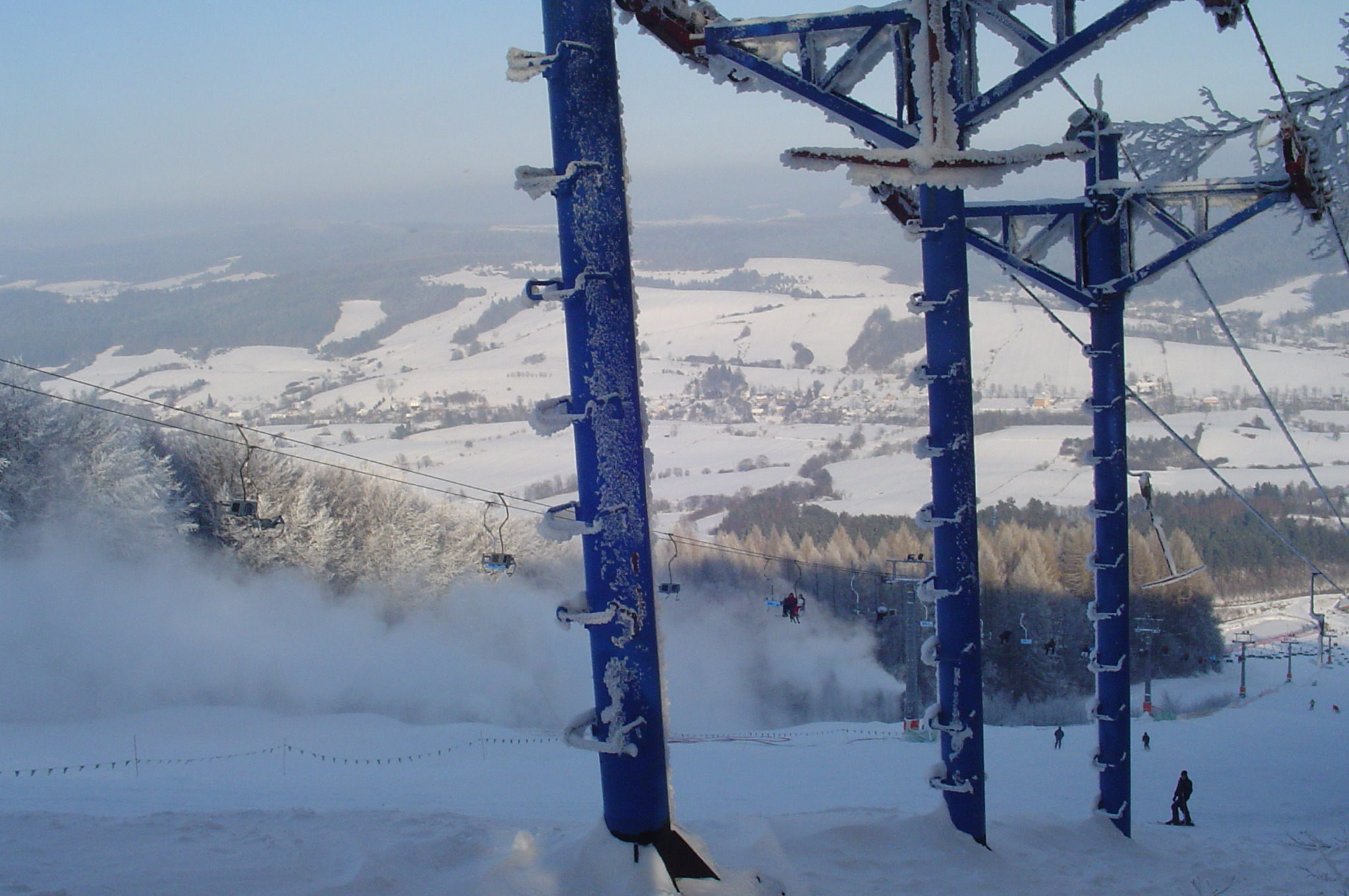 Ustrzyki Dolne, Laworta Wyciąg, zima